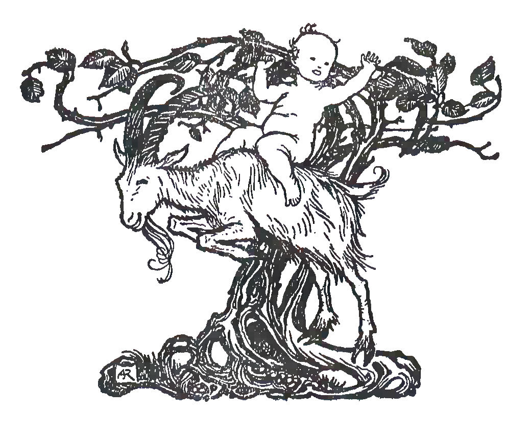 grafika z książki PL "Przygody Piotrusia Pana" publikacja Wydawnictwo J. Mortkowicza Warszawa 1914